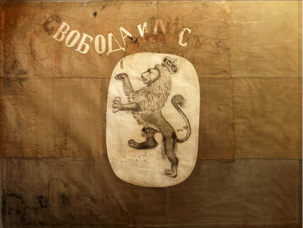 Знамето на старозагорските въстаници от 1875 г.